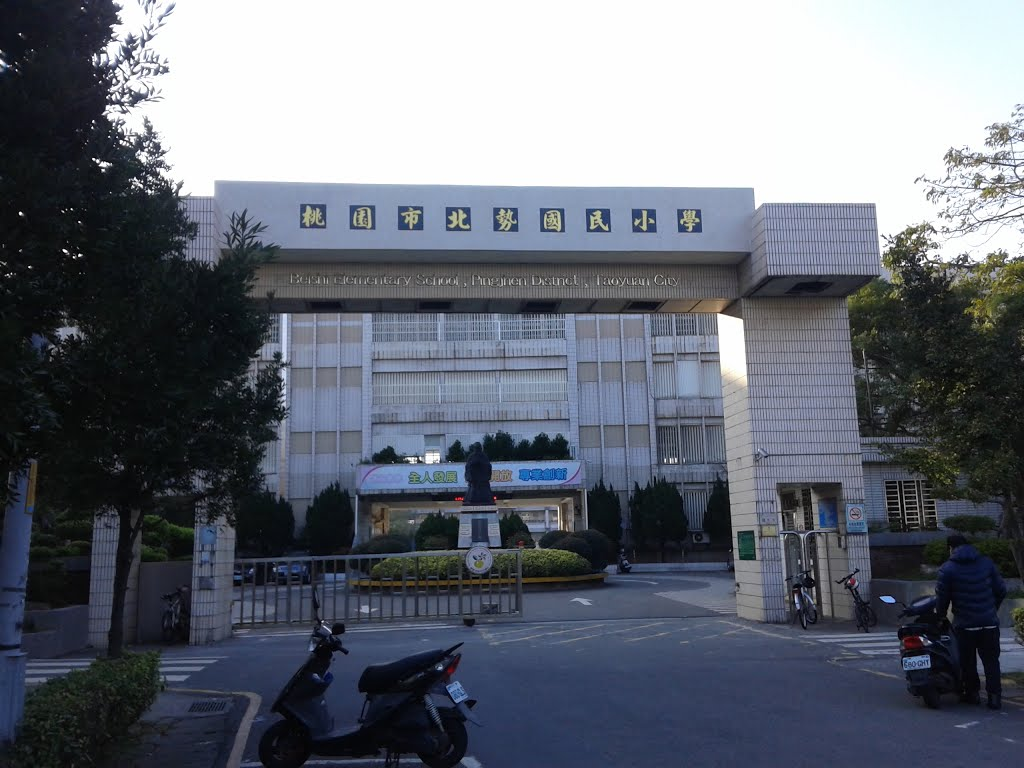 桃園市平鎮區北勢國小。